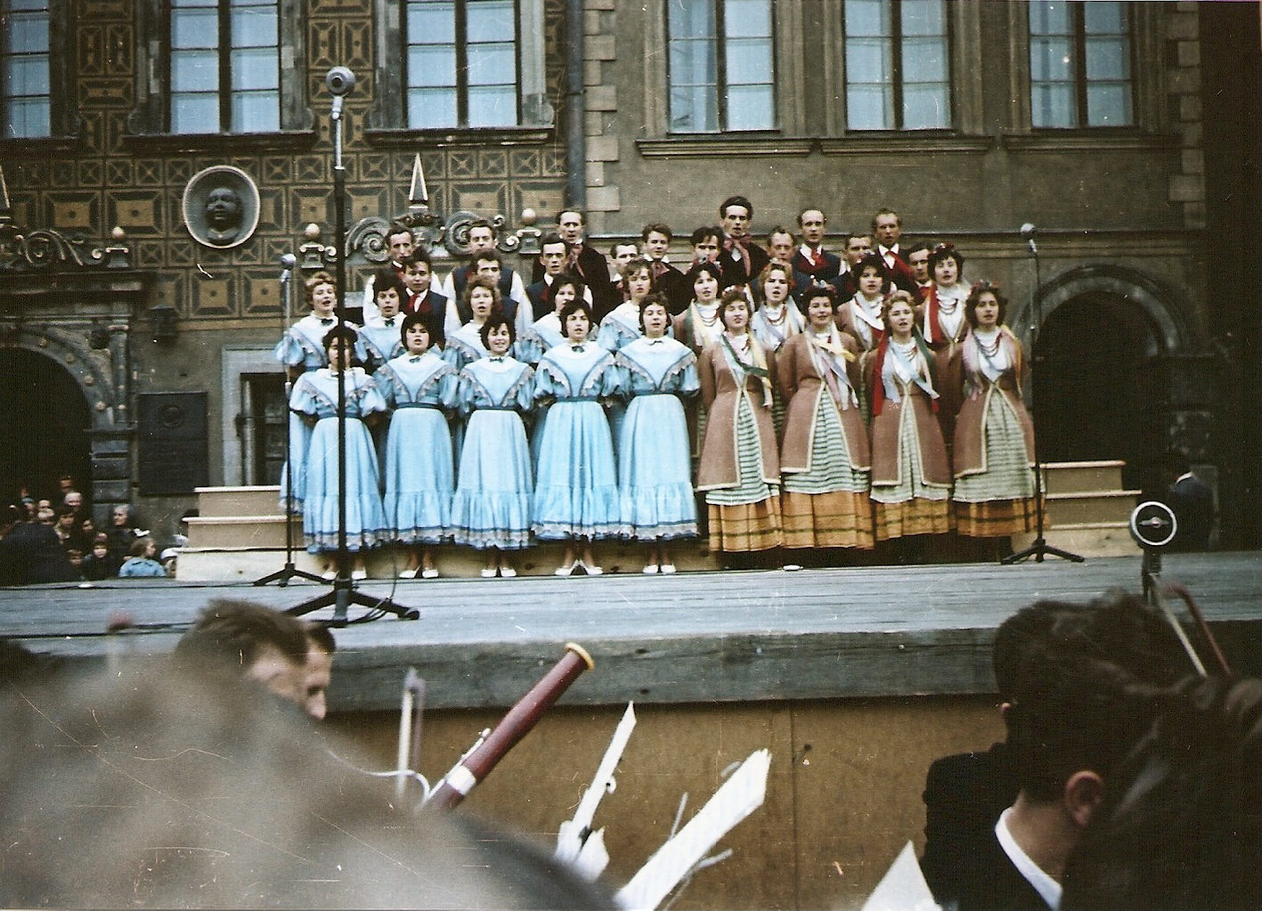 Starówka 1960 – Warszawa, Rynek Starego Miasta – chór